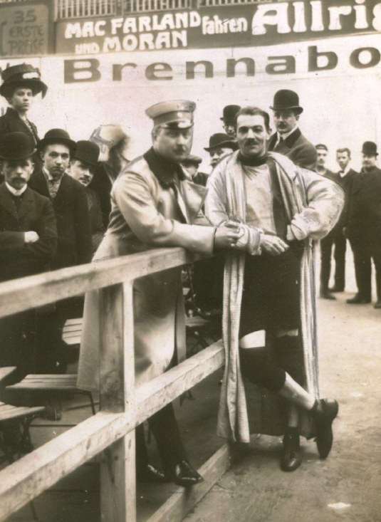 Thaddäus Robl, deutscher Rennfahrer, mit Kronprinz Wilhelm, 1. Berliner Sechstagerennen 1909